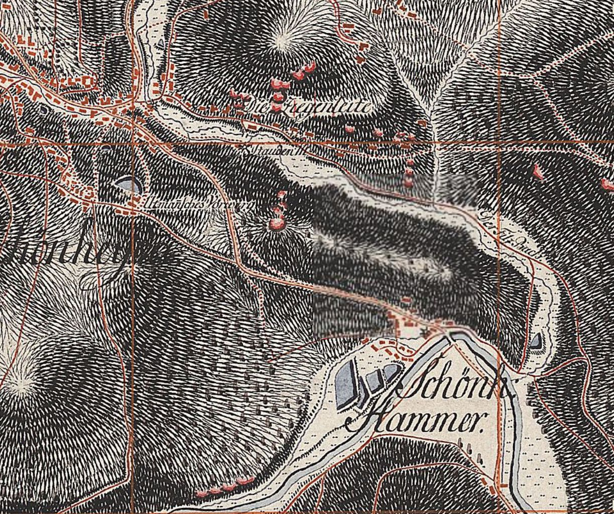 Ausschnitt Schönheiderhammer und Teil von Schönheide mit Angabe des Uttmannschen Vorwerks, des Verlaufs des Filzbaches und der drei Mühlen an der Mündung des Schönheider Dorfbachs in den Filzbachs, am Filzbach (mit Bezeichnung in der Karte Staudenmühle) und in Schönheiderhammer. Aus Blatt 196 der Berliner Ausgabe 1792 entstandenen Sächsischen Meilenblättern von Friedrich Ludwig Aster.Link zum Kartenblatt in der Staats- und Universitätsbibliothek Dresden